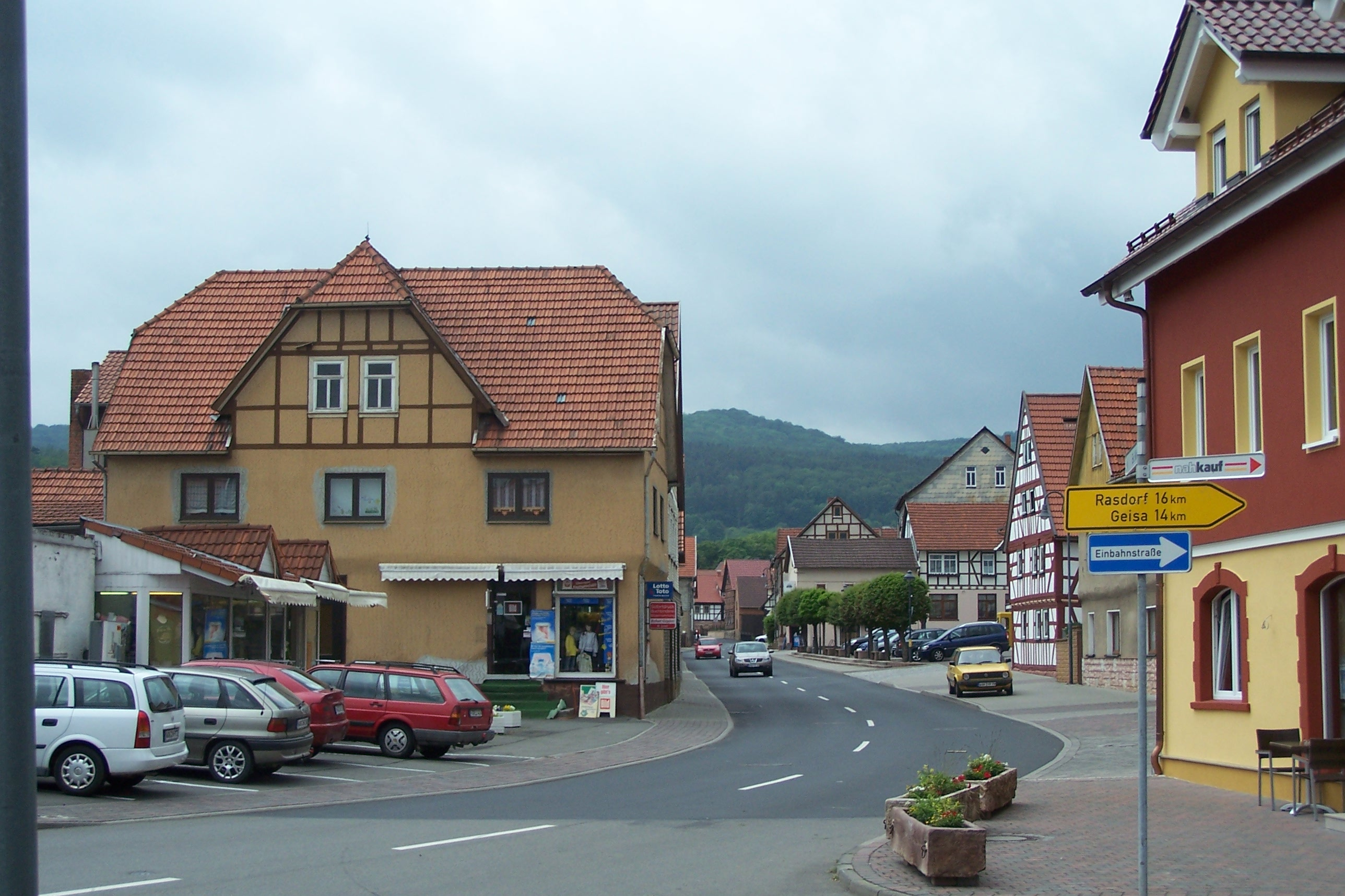 Dermbach